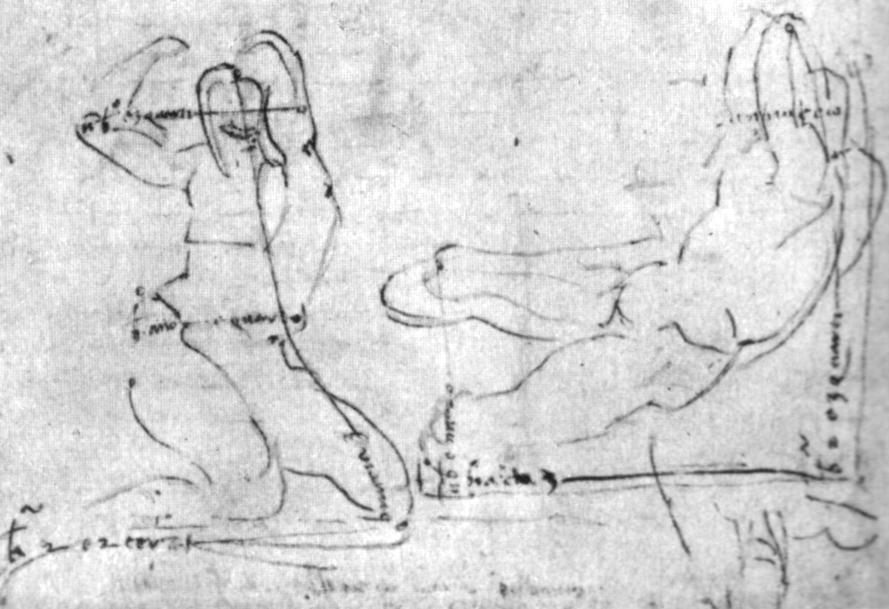 Michelangelo, studio per un dio fluviale nel blocco di amrmo, 1520-1525, british museum